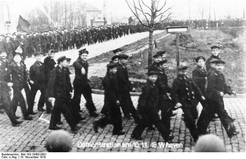 Die Geschichte der deutschen Arbeiterbewegung Die roten Matrosen auf der Demonstration zur Großkundgebung am 10.11.1918 in Wilhelmshaven